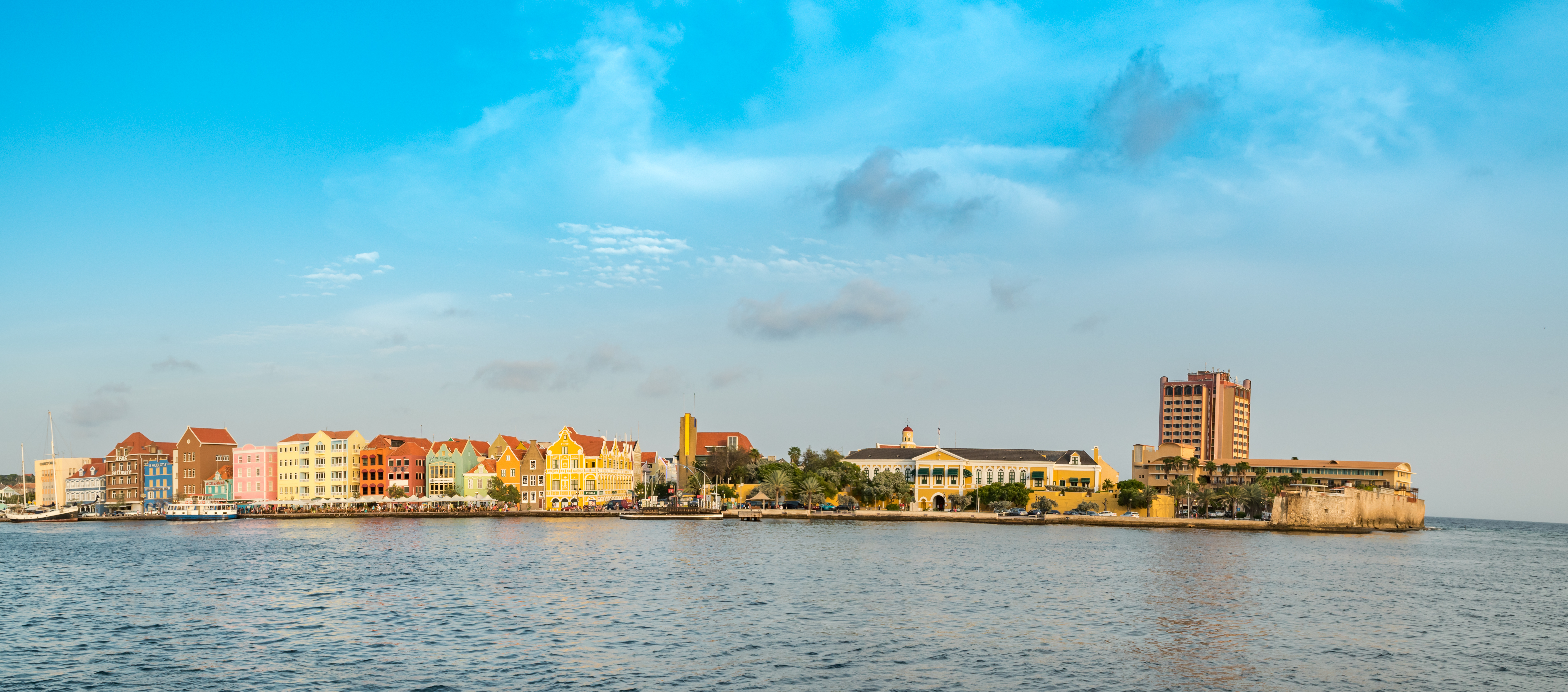 Curacao Willemstad Pano Curacao